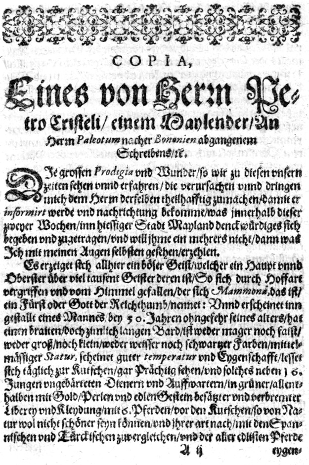 Descrizione di avvenimenti soprannaturali a Milano durante la peste del 1630